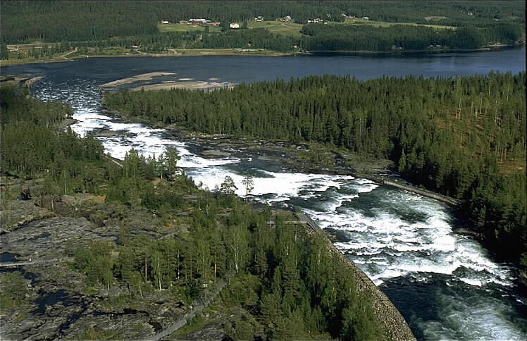 Motiv: Storforsen Nyckelord: Flygbilder, Naturreservat, Riksintressen Kategori: Insjömiljöer Storforsen